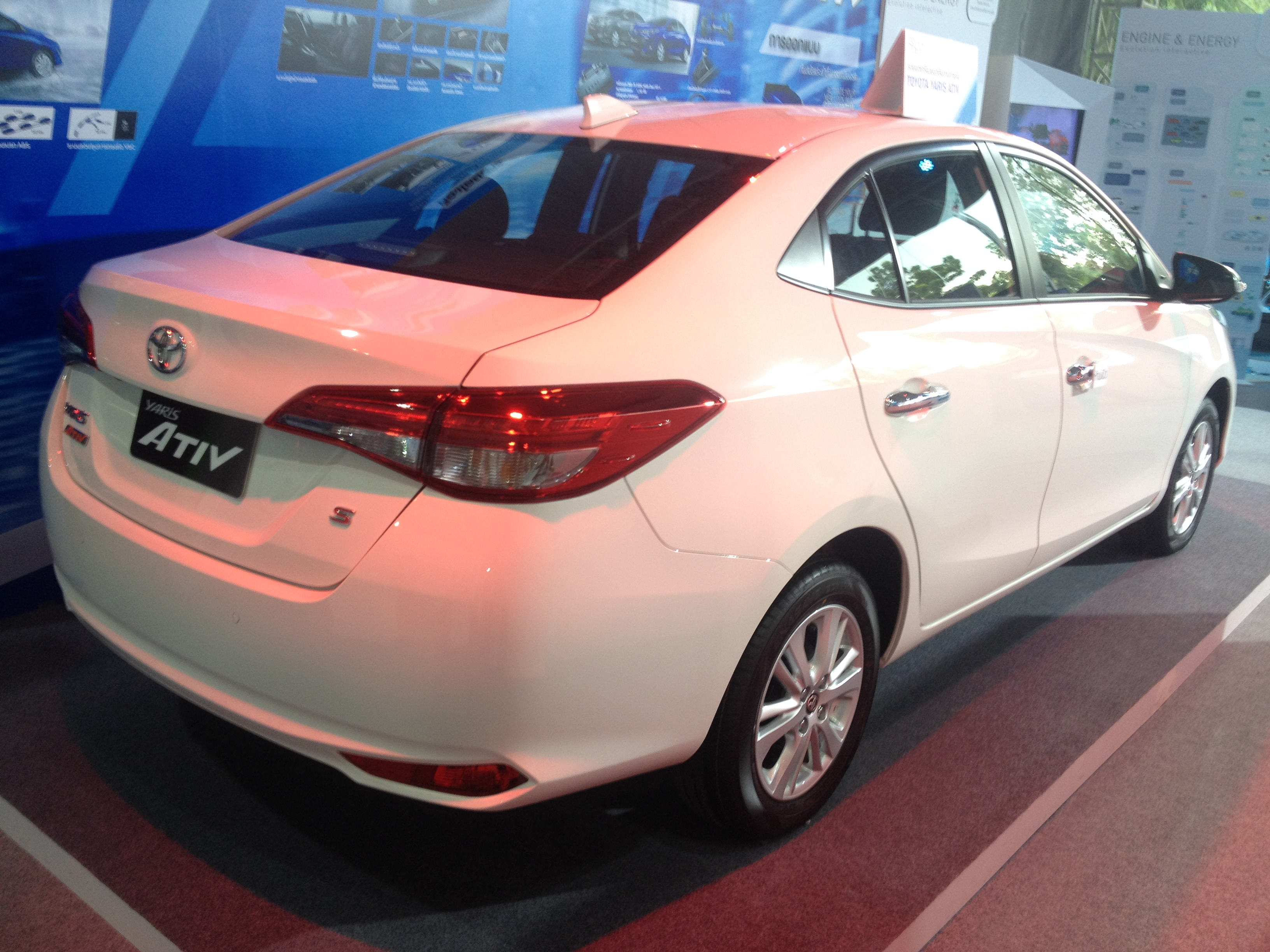 ด้านหลังโตโยต้า ยาริส เอทีฟในงานโตโยต้า เอ็กซ์โปที่เซ็นทรัล ขอนแก่น